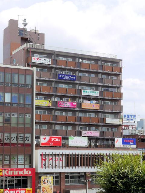 千葉市稲毛区 第一大越ビル